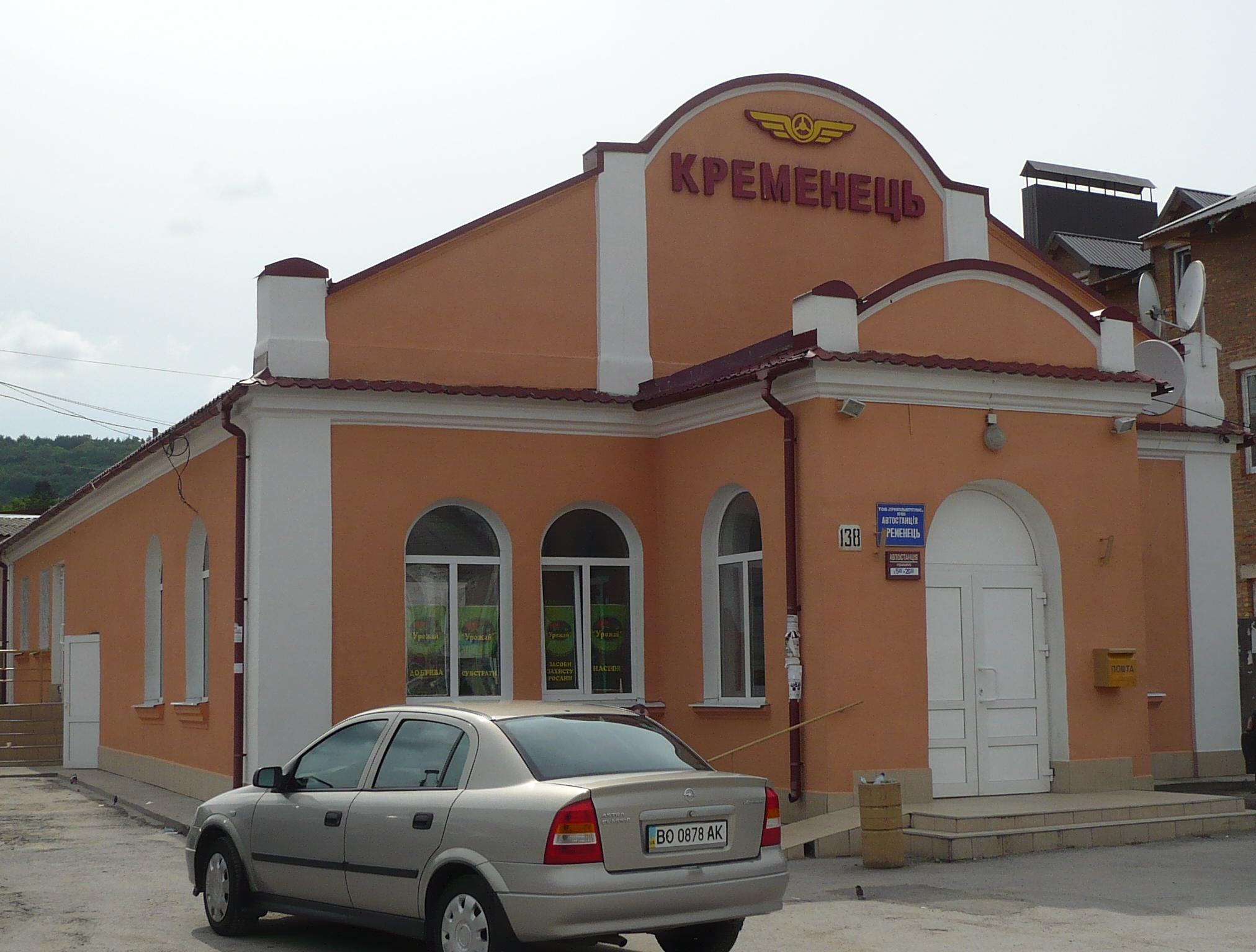 Synagoga w Krzemieńcu